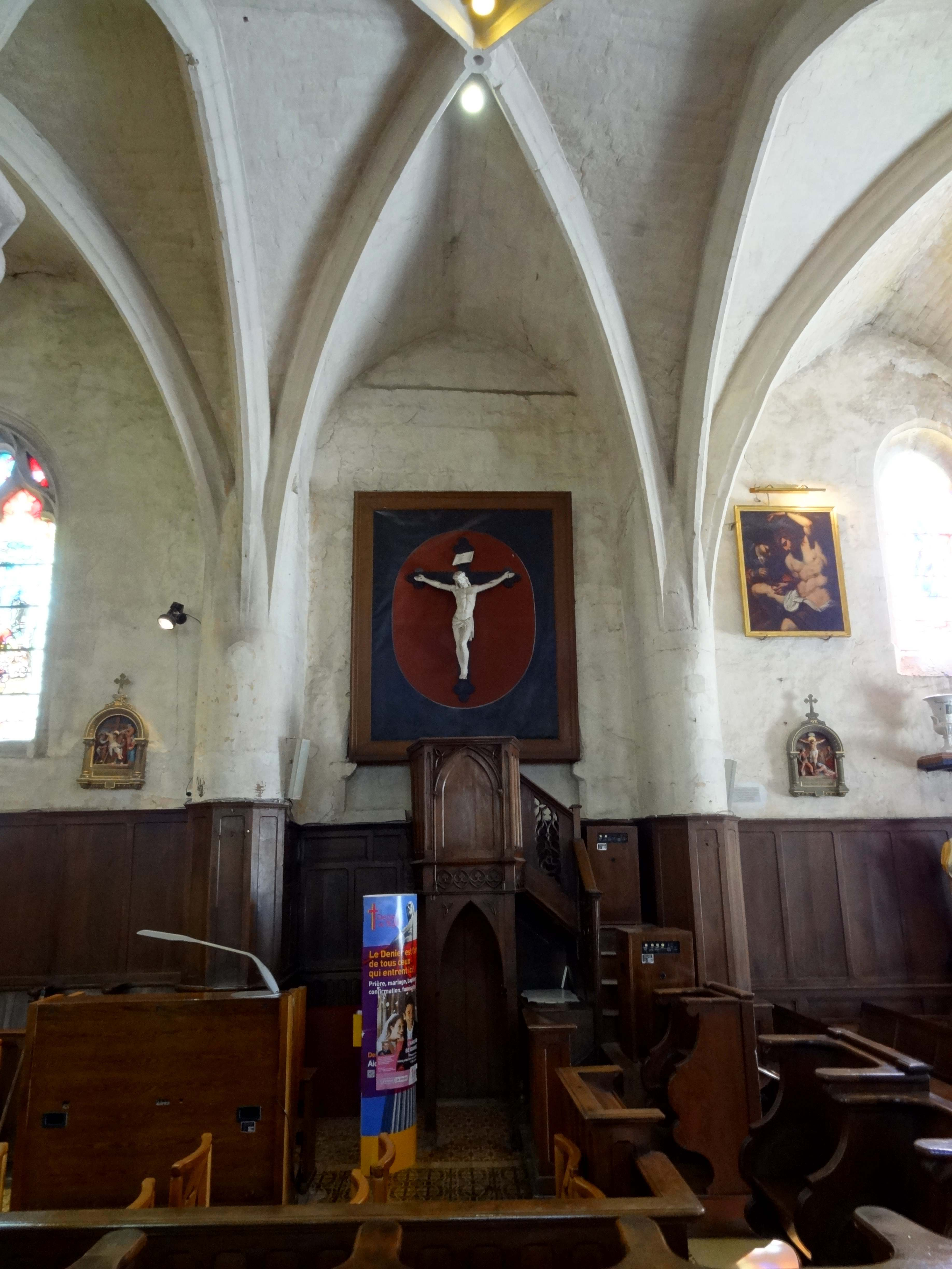 Intérieur de l'église - voir titre.